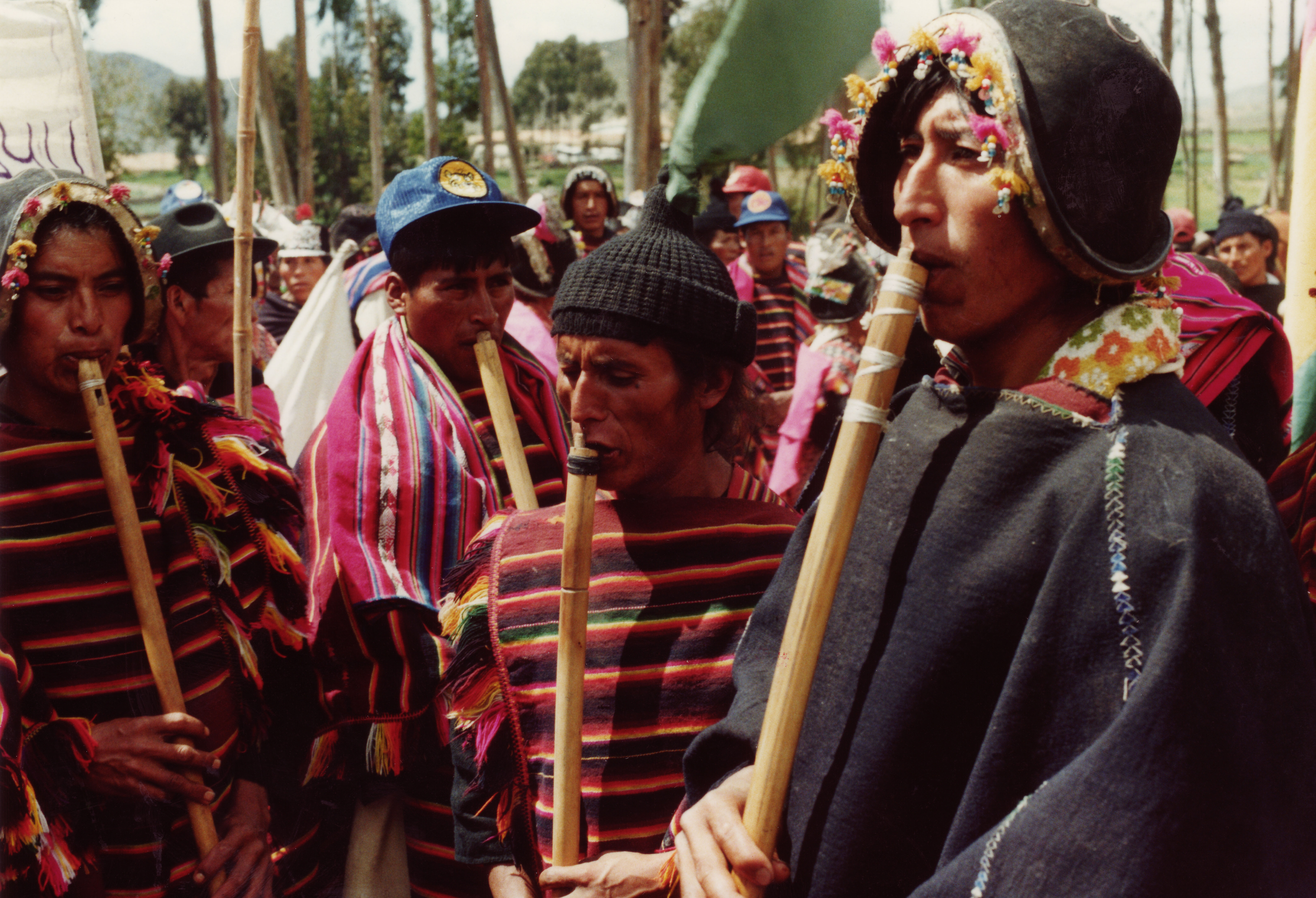 Tarabuco interpretando musica de pujllay